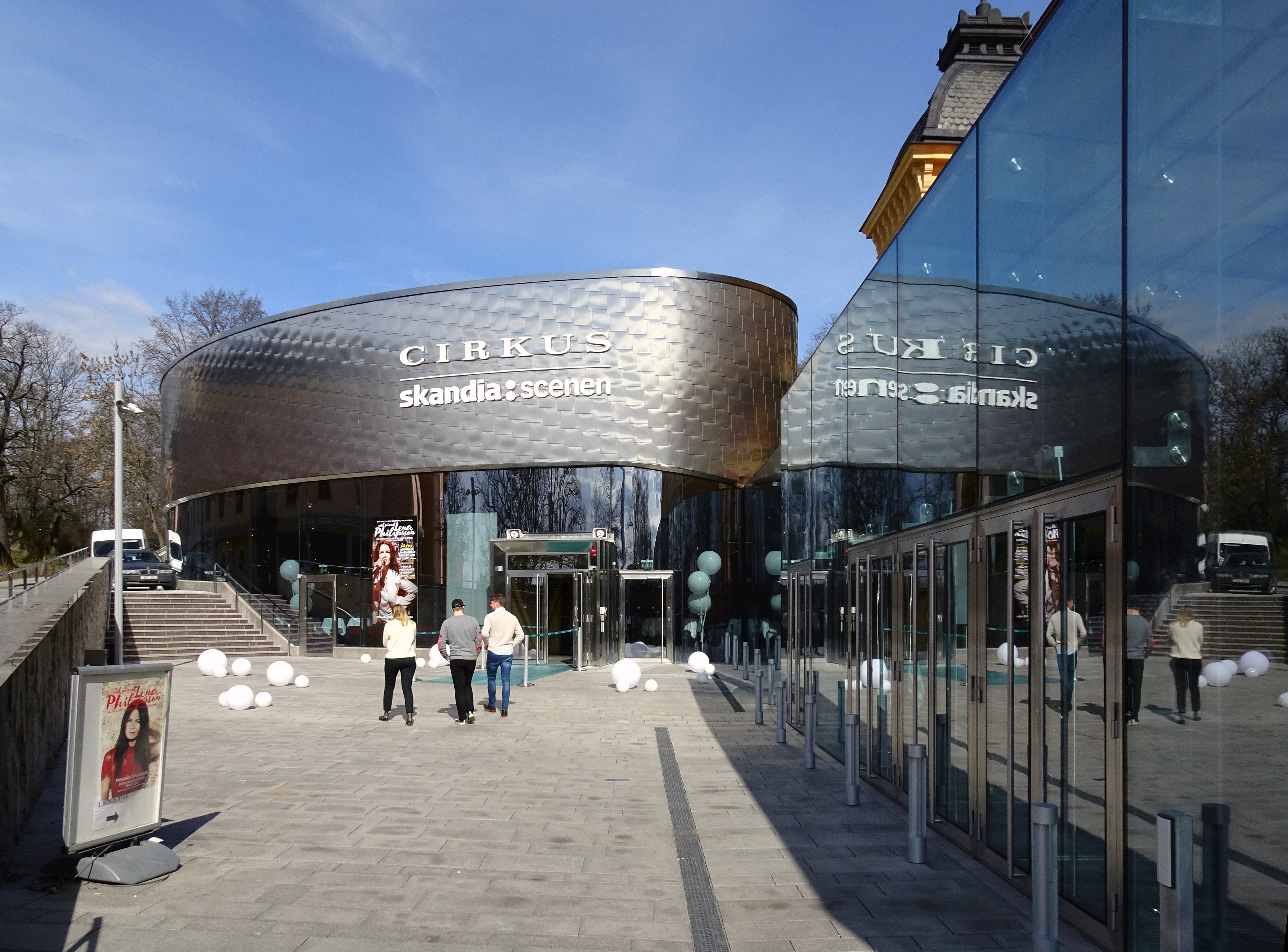 Skandiascenen vid Circus, Stockholm